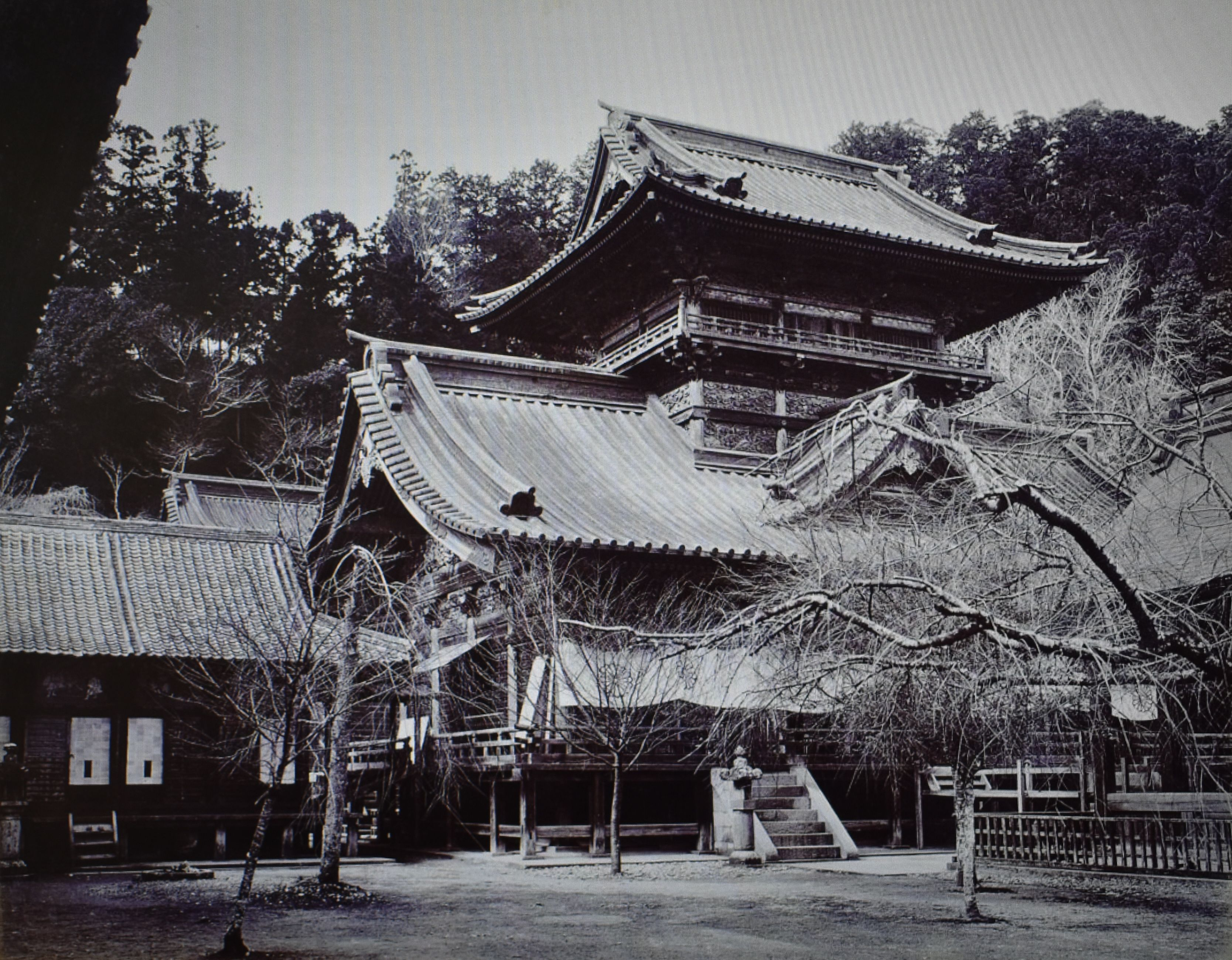 明治期 静岡浅間神社